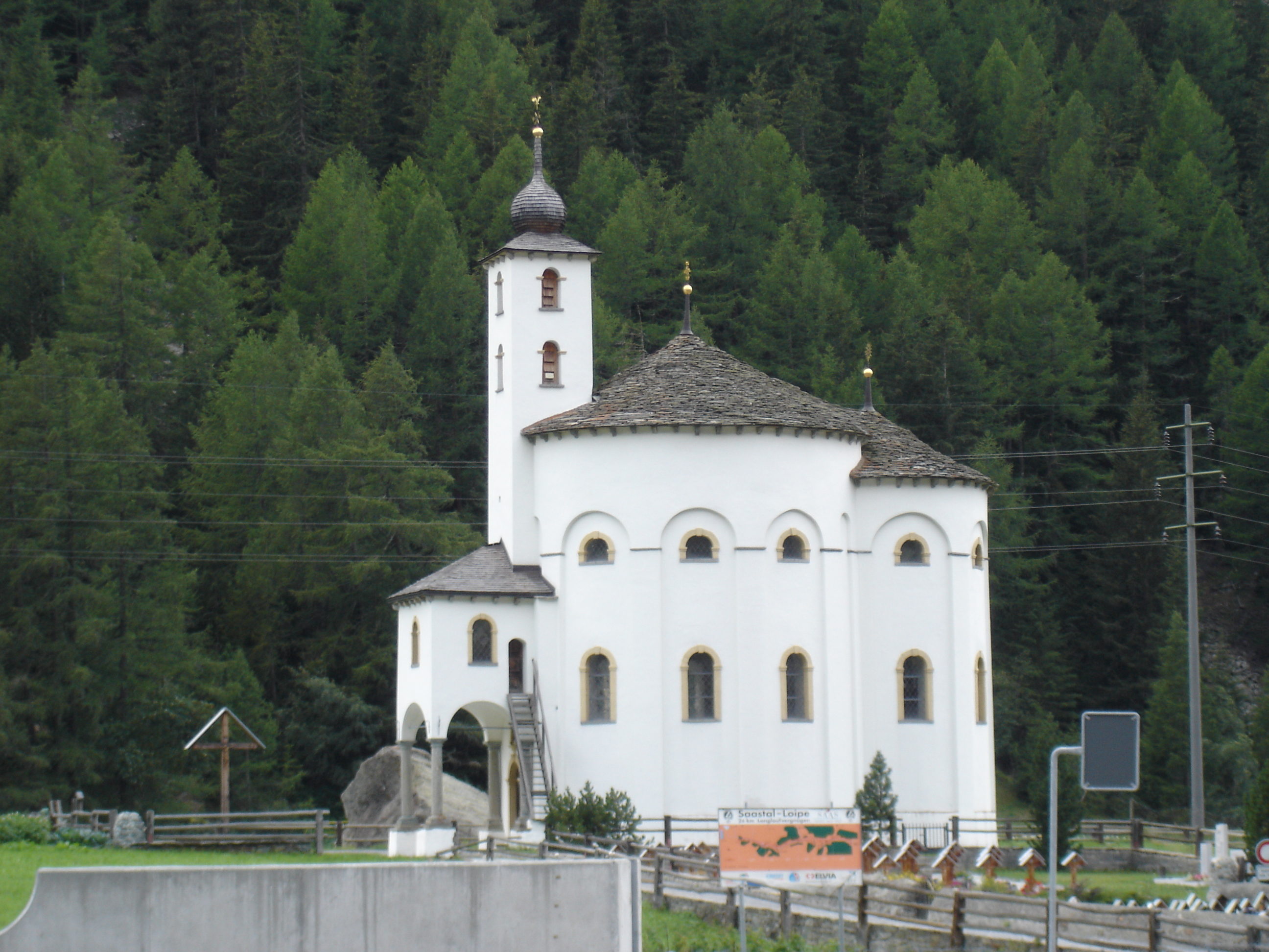 Rundkirche in Saas Balen im Wallis